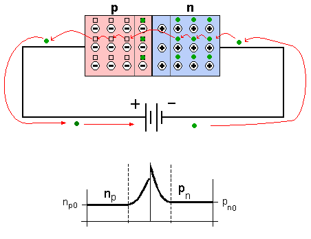 Diodo polarizado directamente Creado por --Biohazard910 y Willy, (discusión) categoría:electrónica (imagen)